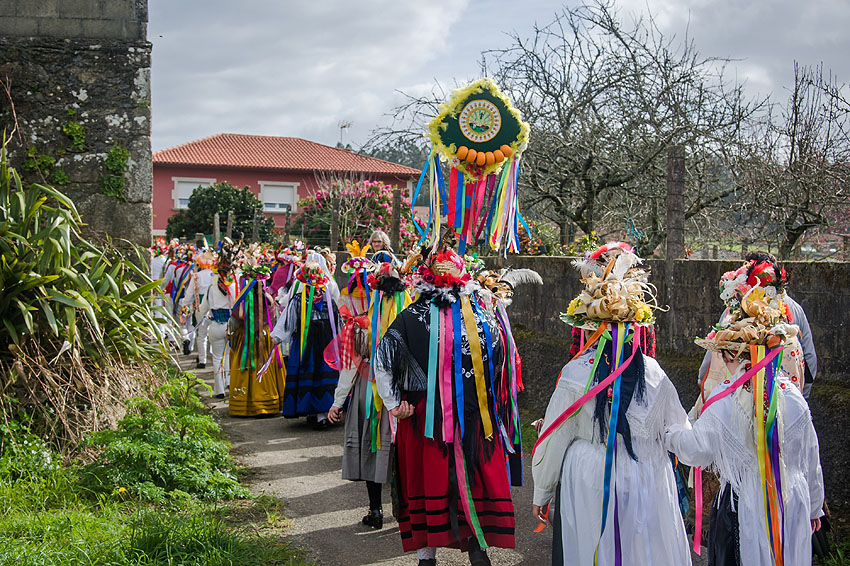 Celebración do Entroido na aldea de Samede